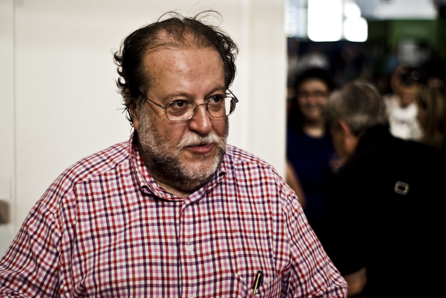 El dibujante Óscar Nebreda, en el XXVI Salón del Cómic de Barcelona.